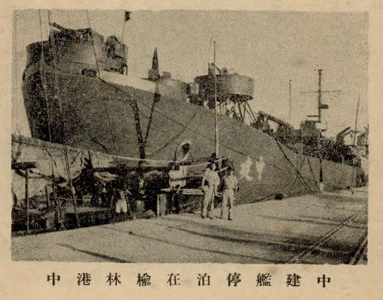 中國新海軍插圖